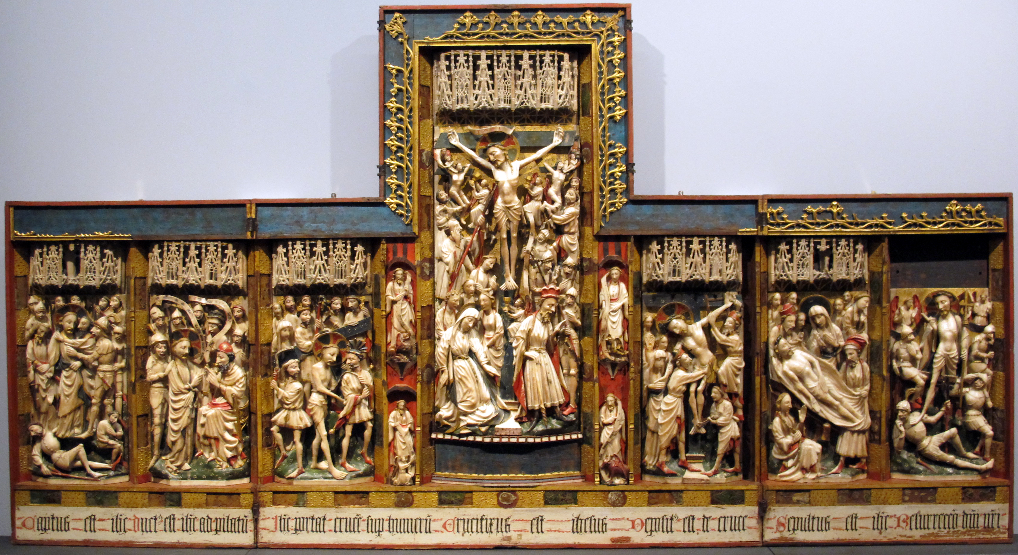 Galleria Napoletana (Museo di Capodimonte)